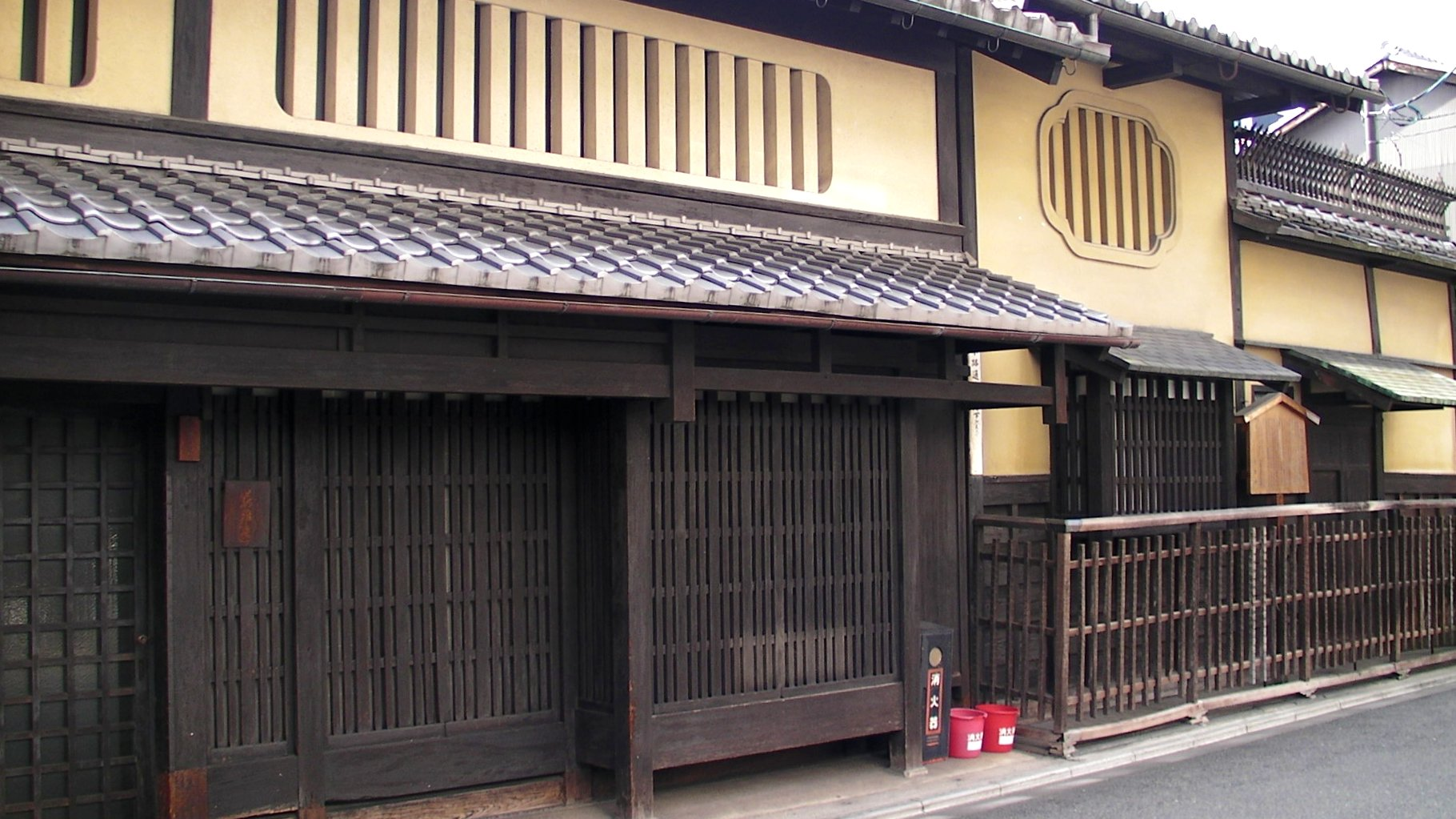 油小路通錦小路にある野口家住宅。